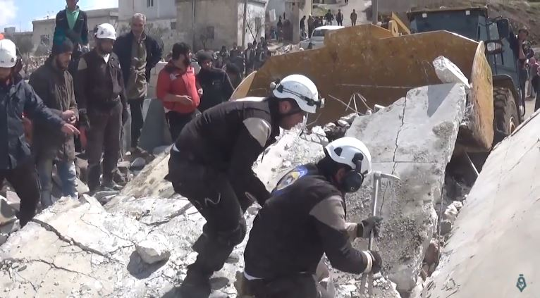 Casques blancs de la Défense civile syrienne à Kafrowaid, un village au sud d'Idleb, le 21 mars 2017